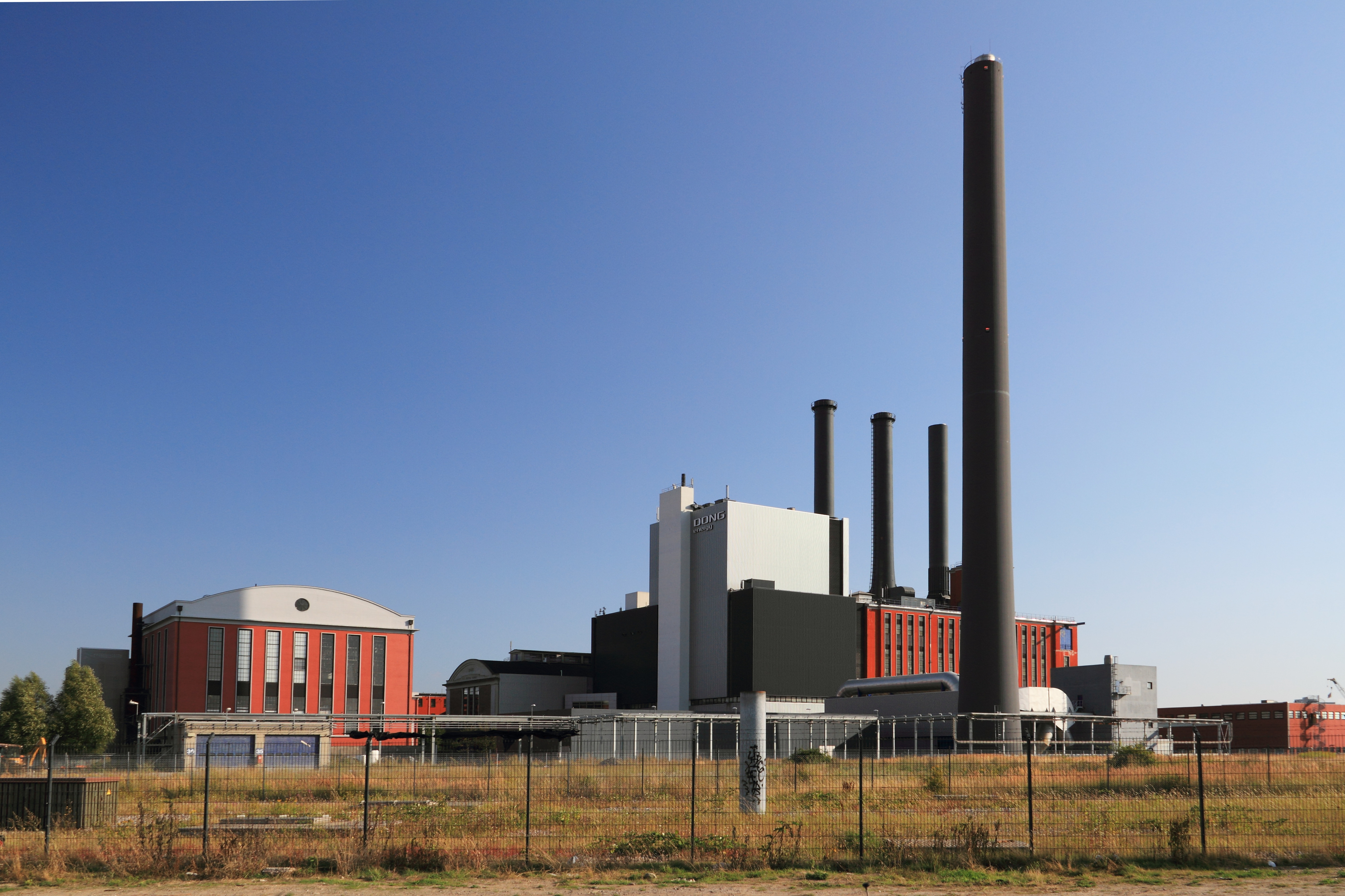 Das Kraftwerk H. C. Ørstedværket von DONG Energy in Kopenhagen.